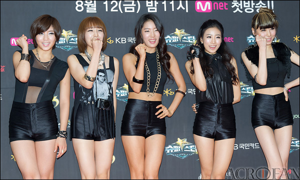 브레이브걸스. 슈퍼스타K 3 하이라이트 시사회 레드카펫 행사장에서